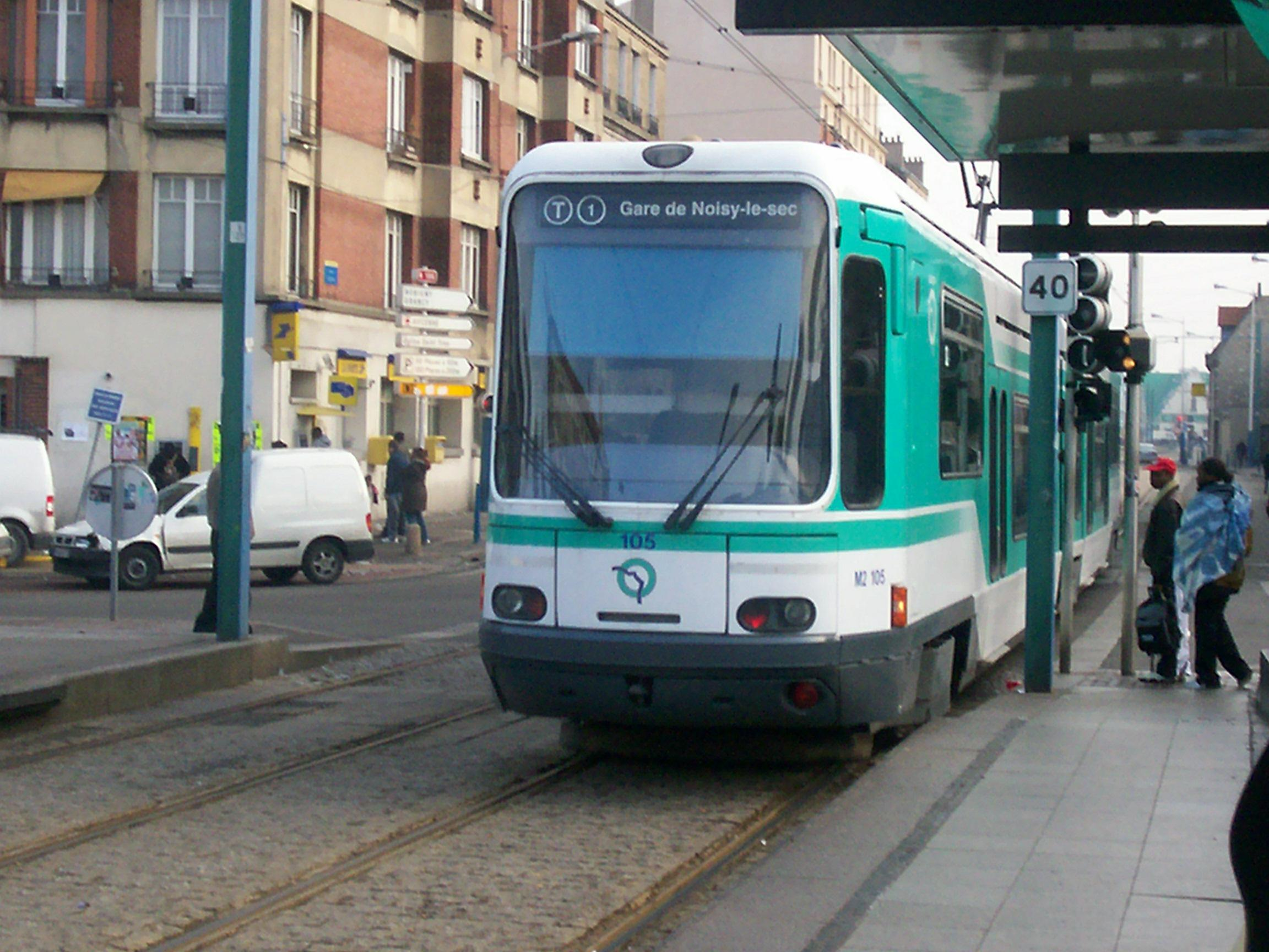 Rame de la ligne t1 parisienne partant de la station La Courneuve-8 Mai 1945 en direction de la gare de Noisy-le-Sec. EOLE99, moi donc je suis la personne qui a prit cette photo le Samedi 7 janvier 2006 Licensing Catégorie:Image de tramway